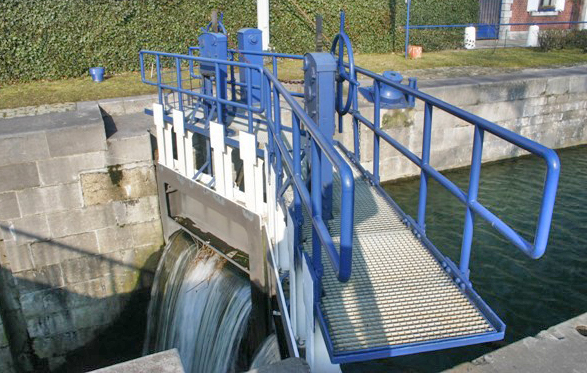 Schleis 1 ënnescht Schleisepaart.